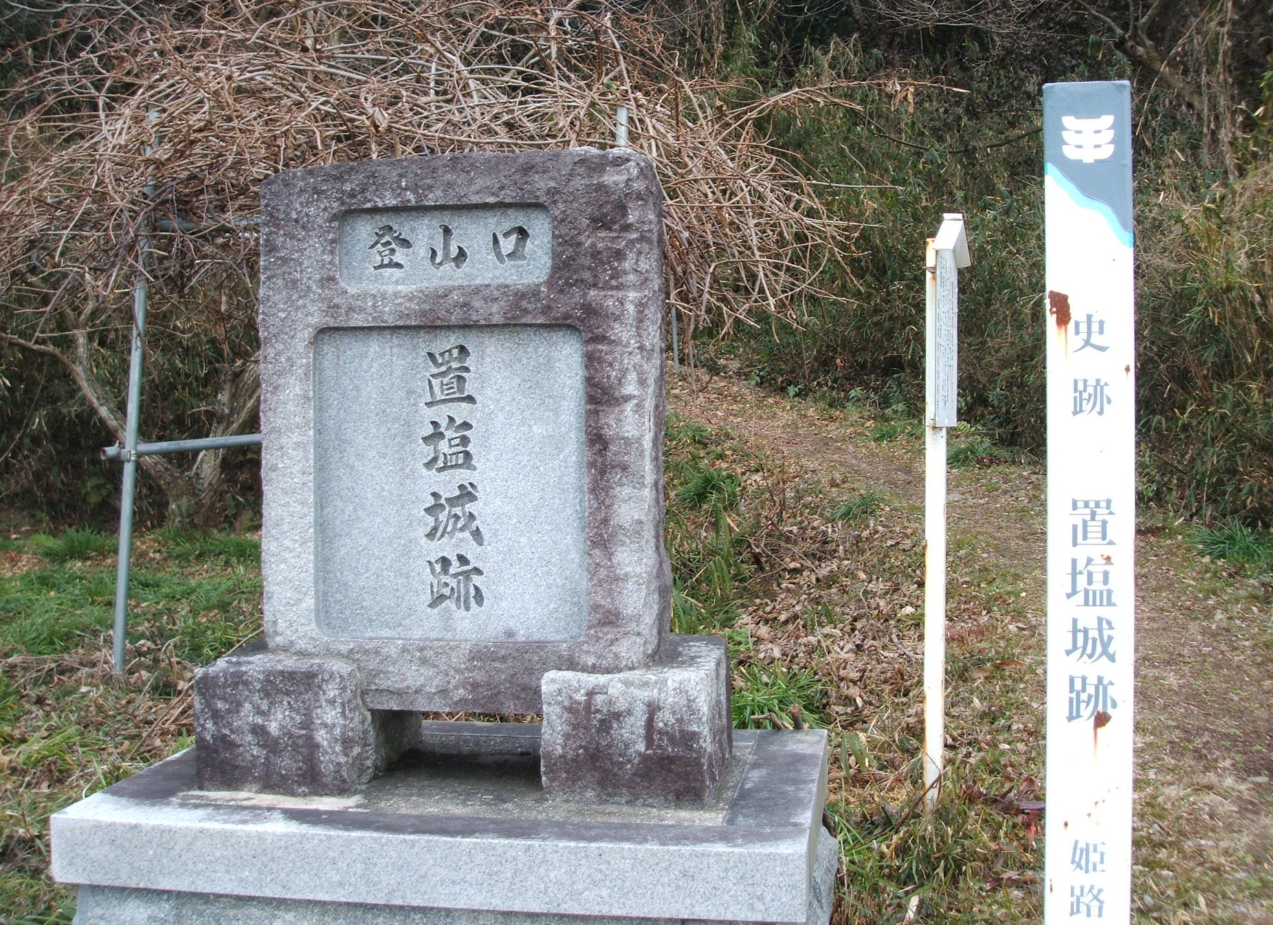 置塩城登山口付近にある石碑